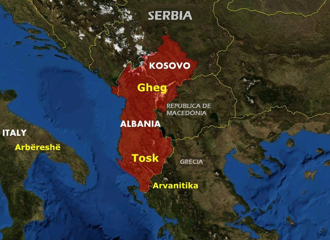 Imatge traduch dempuèi un document commons liure de drech per Cedric31 23 de nov de 2006 a 14:01 (UTC)